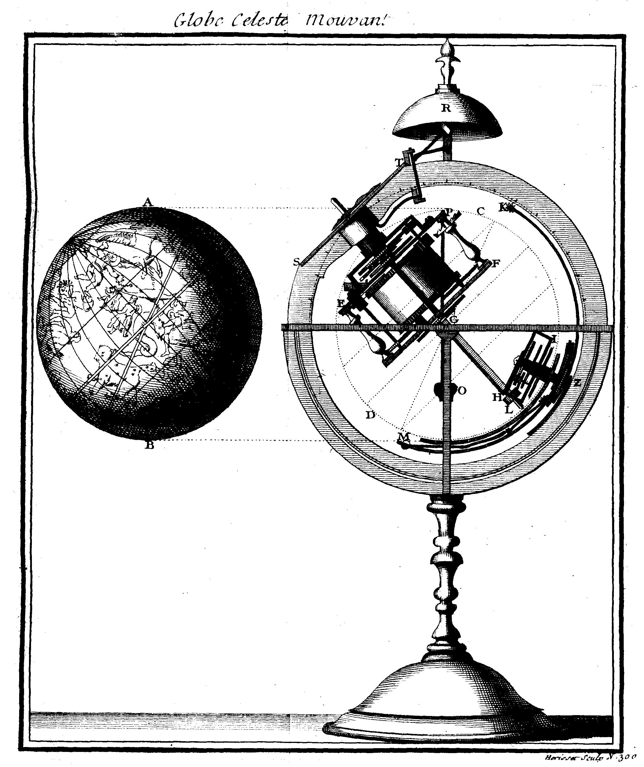 Représentation du globe mouvant d'Outhier présenté en 1727 à l'Ac. des sciences de Paris.